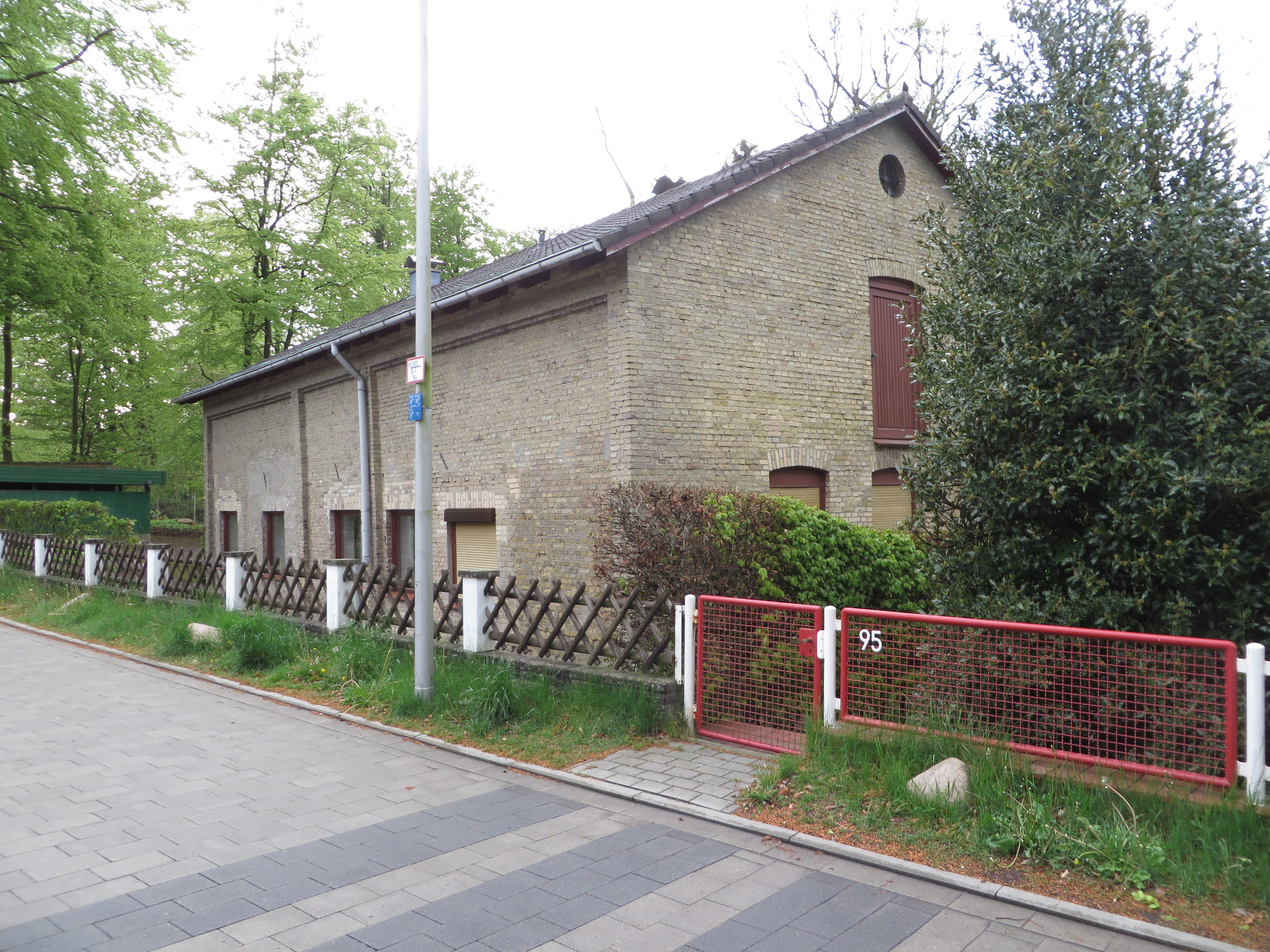 Wirtschatsgebäude der Villa Waldeshöh (Flensburg-Mürwik 6. Mai 2015)